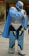 Das ist das Maskottchen der Freezers bei einer der Autogrammstunden während der Saison 2006/07. Das Foto ist selbstgeschossen!.